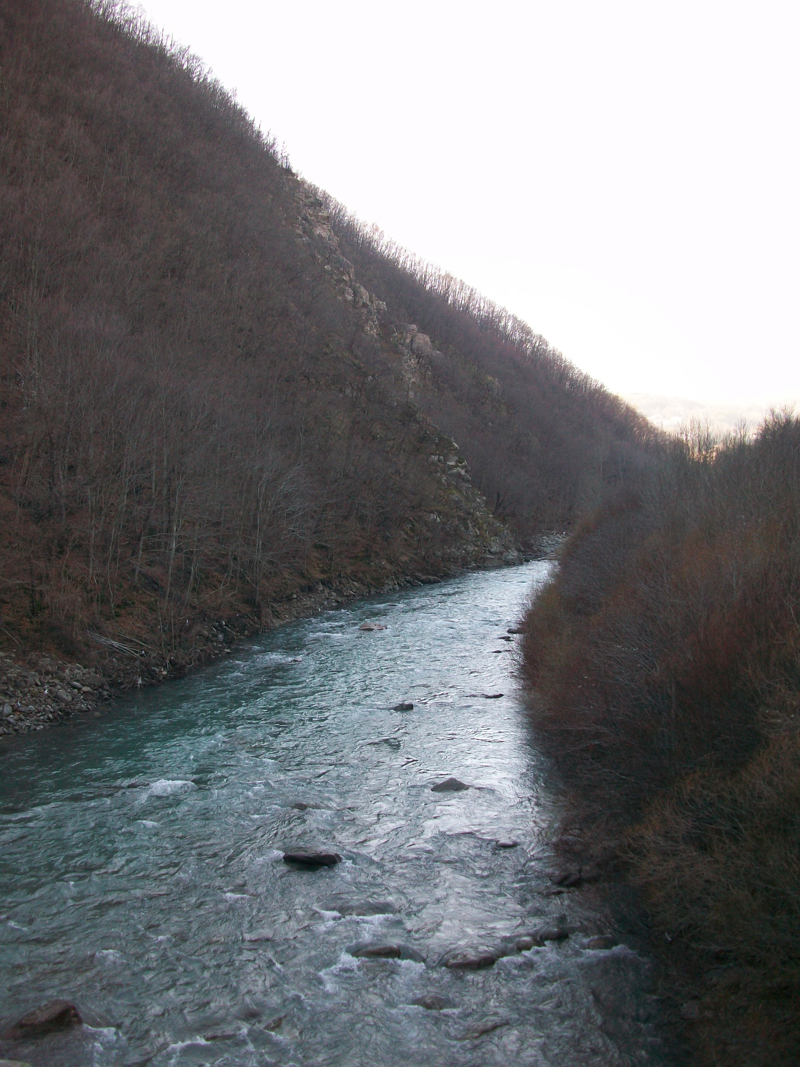 il fiume Scoltenna fra Riolunato e Pievepelago